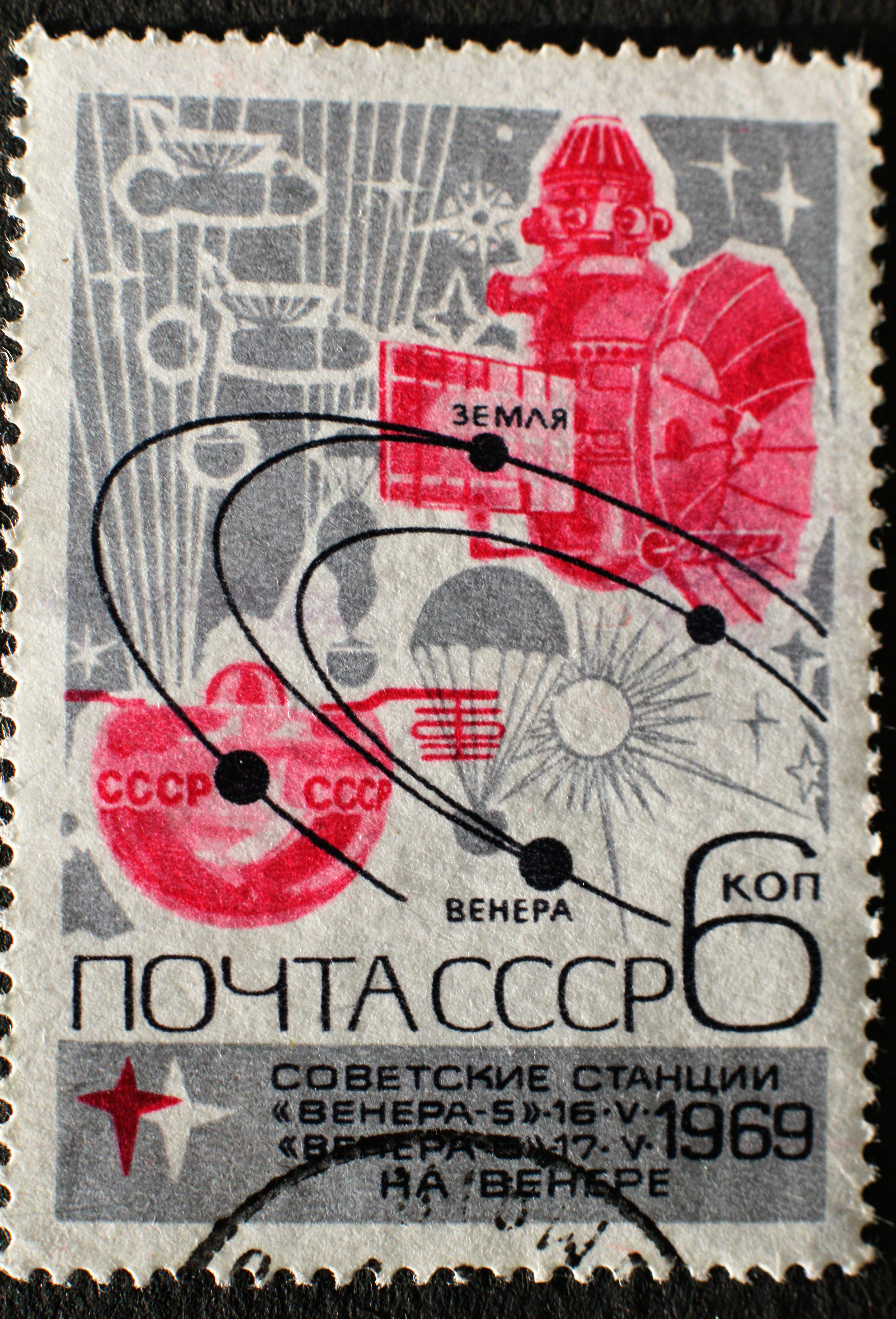 Briefmarke, Sowjetunion